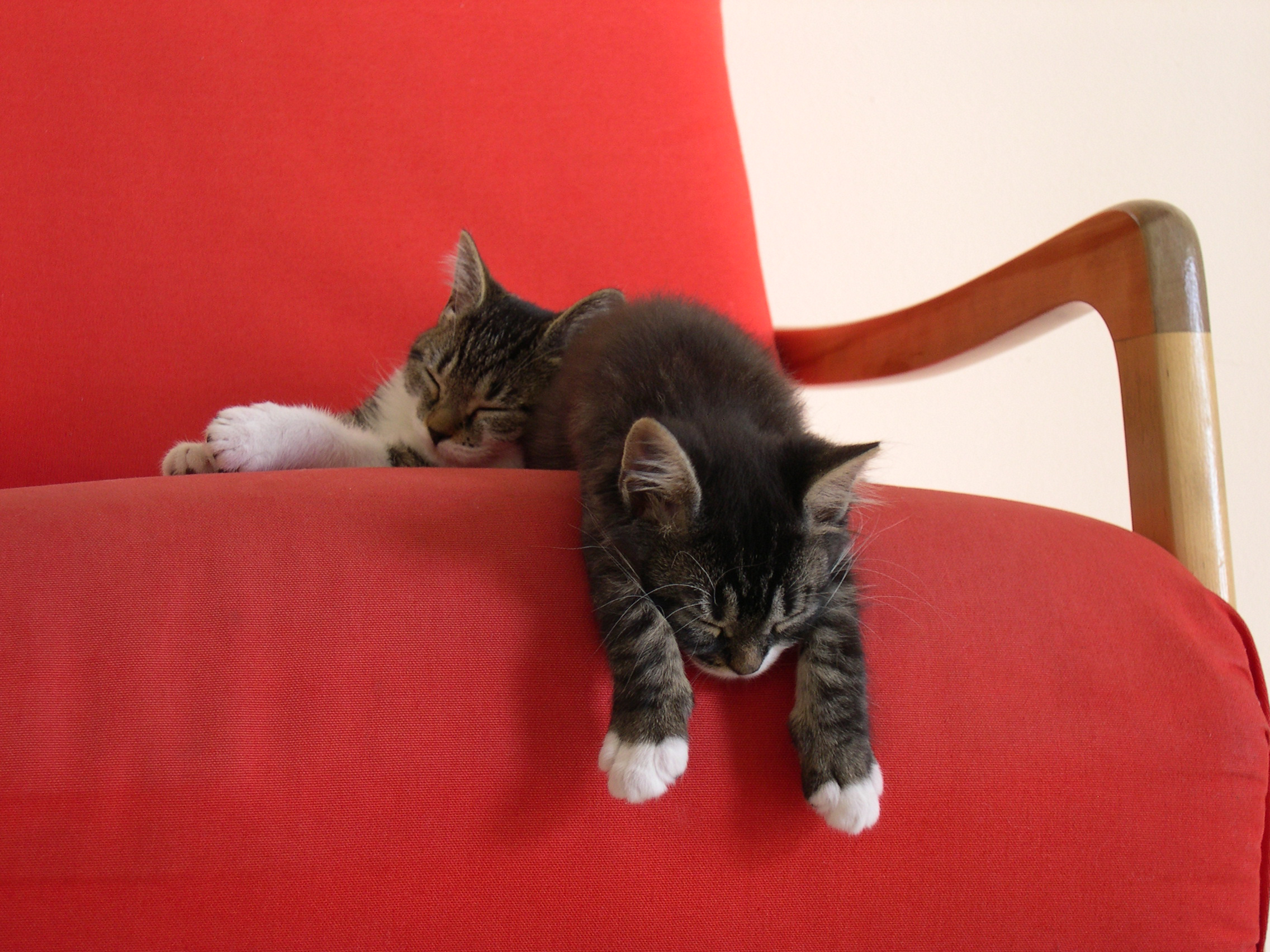 2 kittens taking a nap